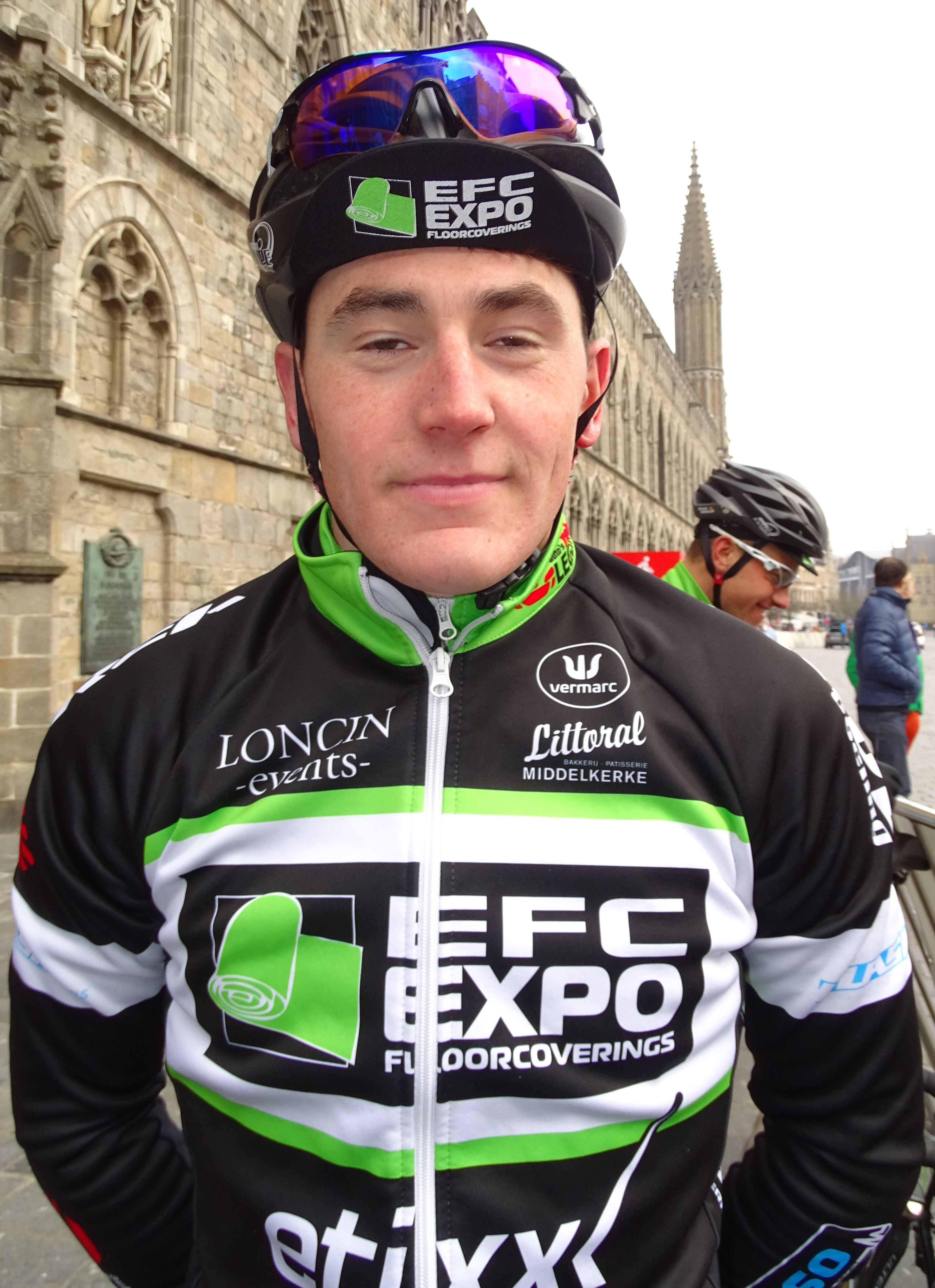 Reportage réalisé le dimanche 15 mars à l'occasion du départ et de l'arrivée de la Course des chats 2015 à Ypres, Belgique.